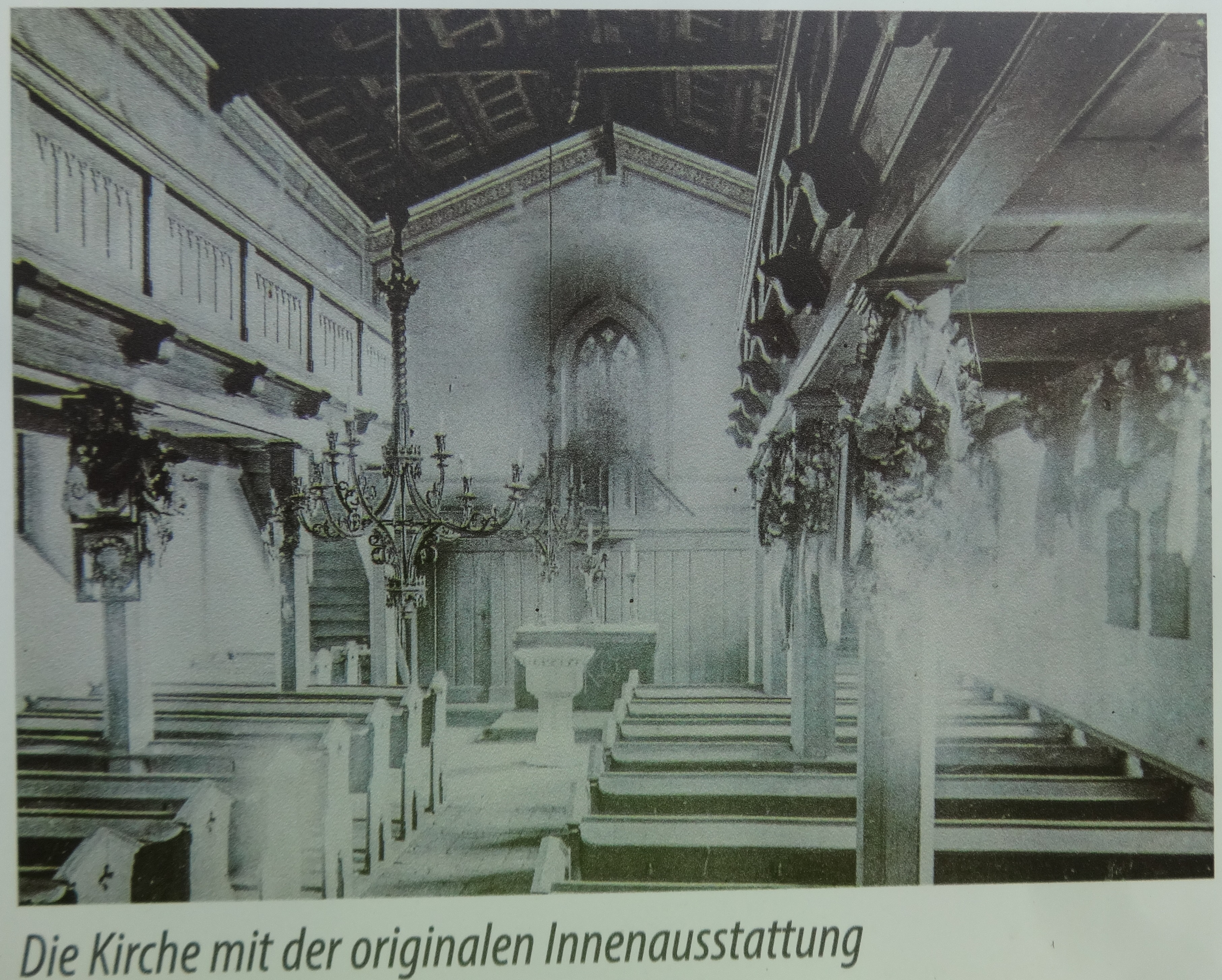 Die Dorfkirche in Stücken im Landkreis Potsdam-Mittelmark ist ein neugotischer Feldsteinbau aus dem Jahr 1860. Die Ausstattung stammt überwiegend aus dem 1950er Jahren. Aufnahme auf einer öffentlich zugänglichen Informationstafel vor der Kirche